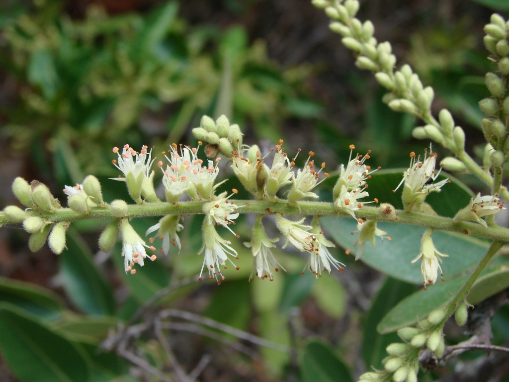 Acosmium dasycarpum - FABACEAE Jardim Botânico de Brasília - Distrito Federal - Brasil.